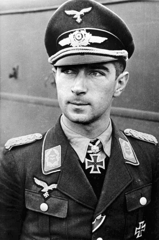 Oberstleutnant [Werner] Mölders, Träger des Ritterkreuzes mit Eichenlaub